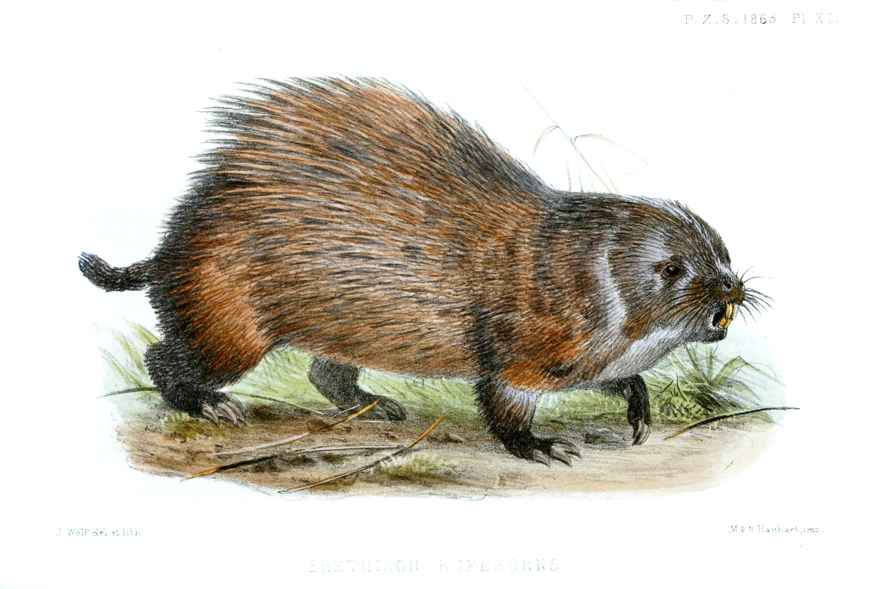 Erethizon rufescens = Echinoprocta rufescens